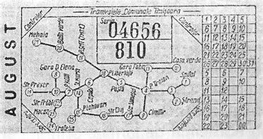 Bilet tramvai Timisoara